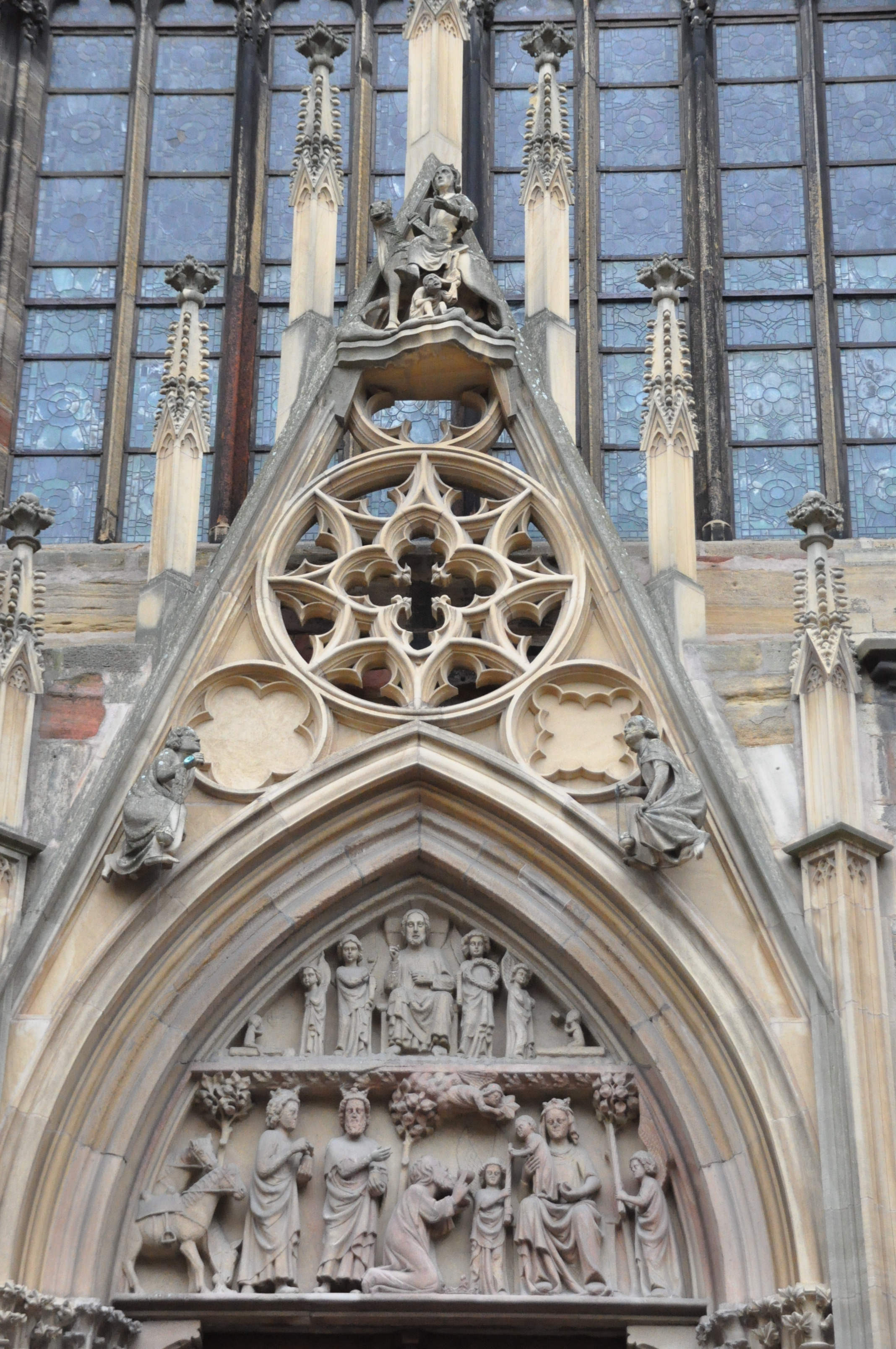 Tympan et gâble, Collégiale Saint-Martinancienne collégiale (Classé) .